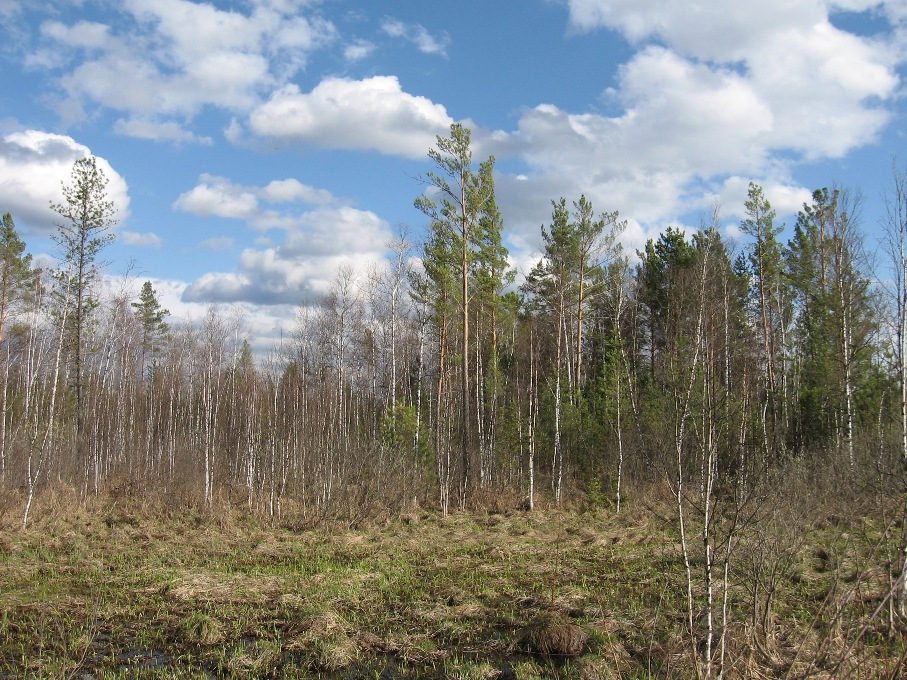 Заболоченный сосново-березовый лес в окрестностях пос. Танзыбей (Красноярский край, Ермаковский р-н)